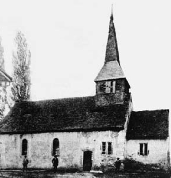 St. Margaretha-Kirche am Tag vor ihrem Abriss am 17. Juni 1889